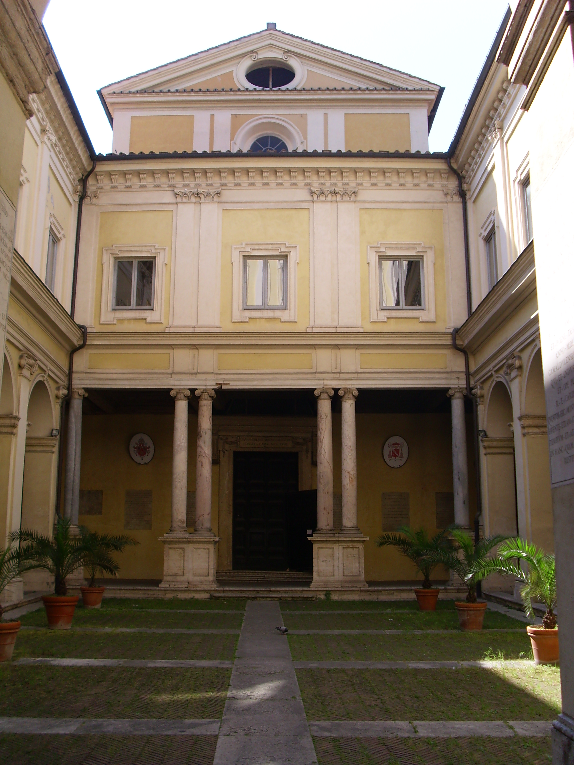 Portico della Chiesa di San Gregorio Magno a Roma.